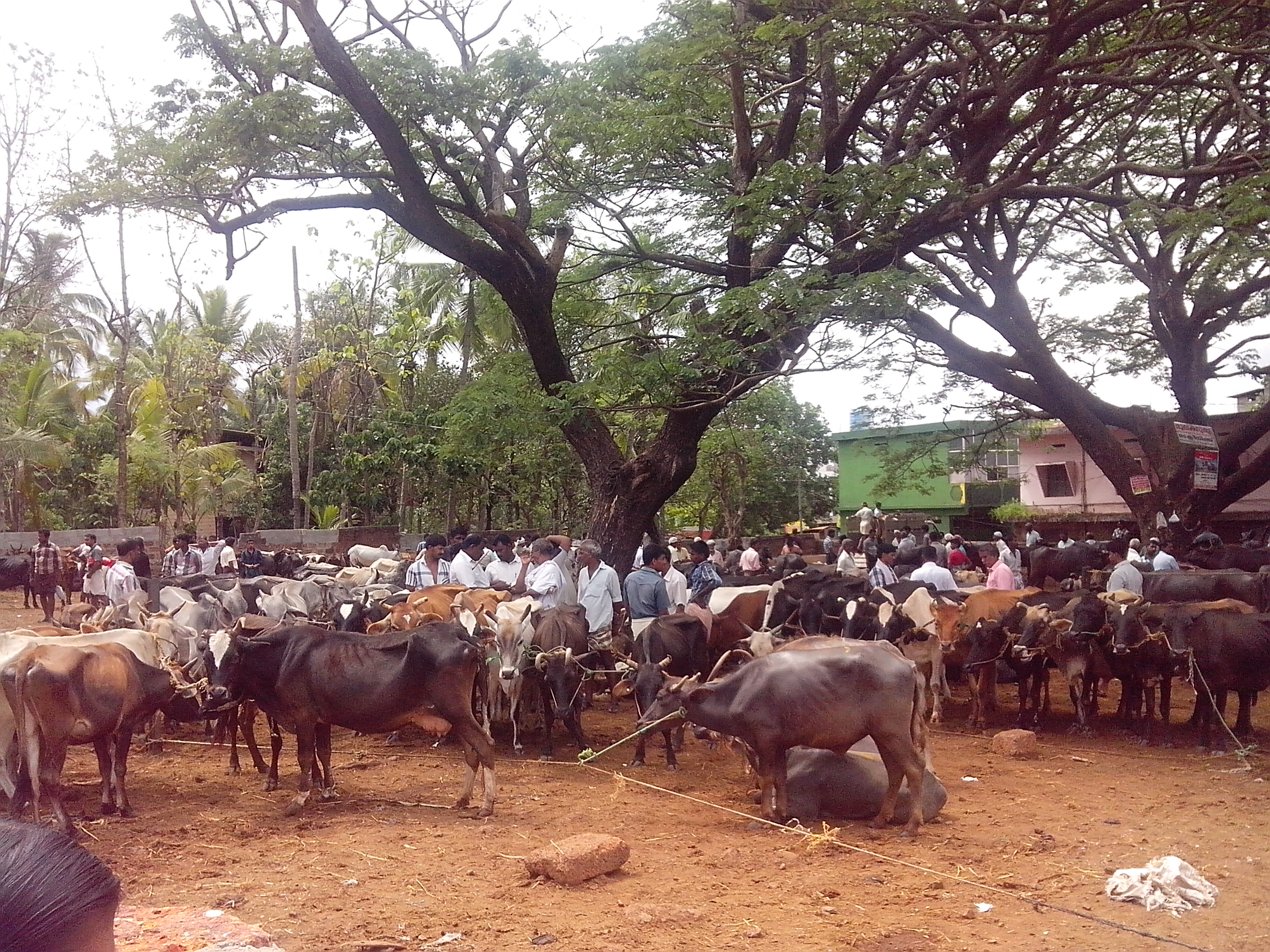 കാലി ചന്ത, നാൽക്കാലി ചന്ത, ചേളാരി ചന്ത